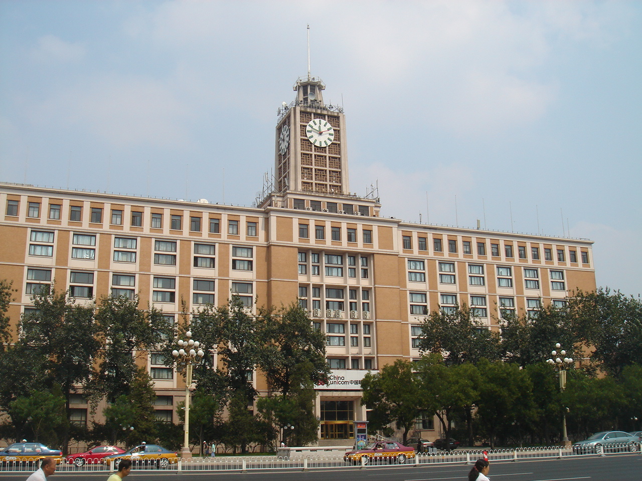 中文（中国大陆）: 北京市西單電報大樓